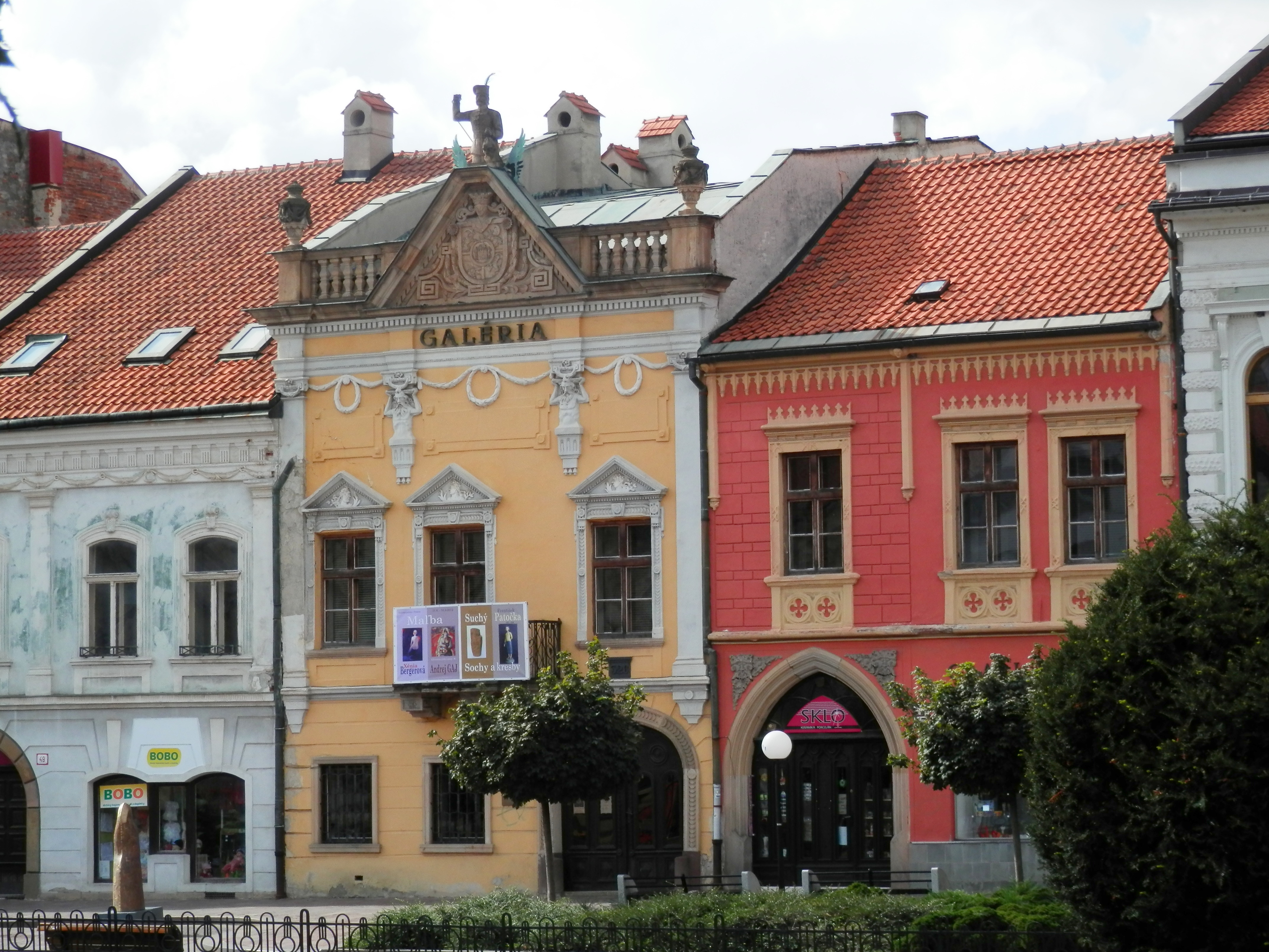 Rad meštianskych historických domov na Hlavnej ulici číslo 49,51,53.Mesto Prešov.